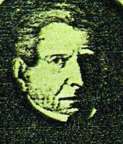 Gregorio Jove y Valdés, político asturiano